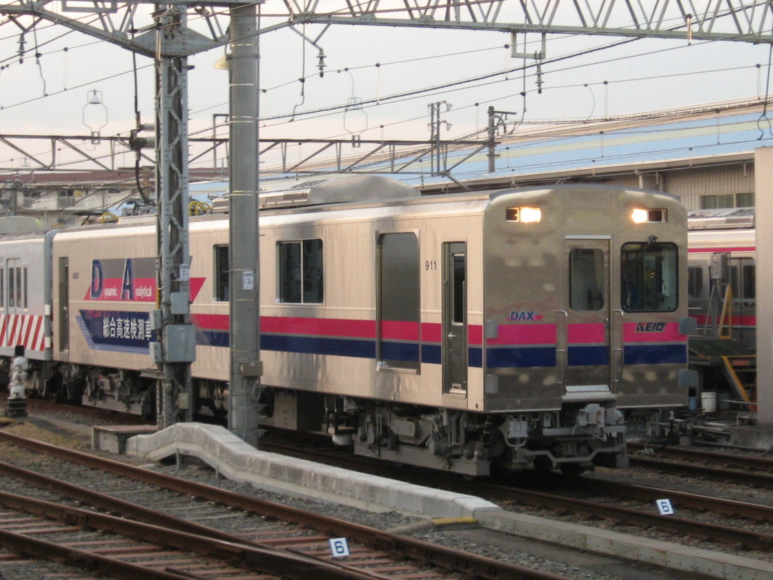 京王クヤ911、入換運転台使用時 高幡不動検車区にて